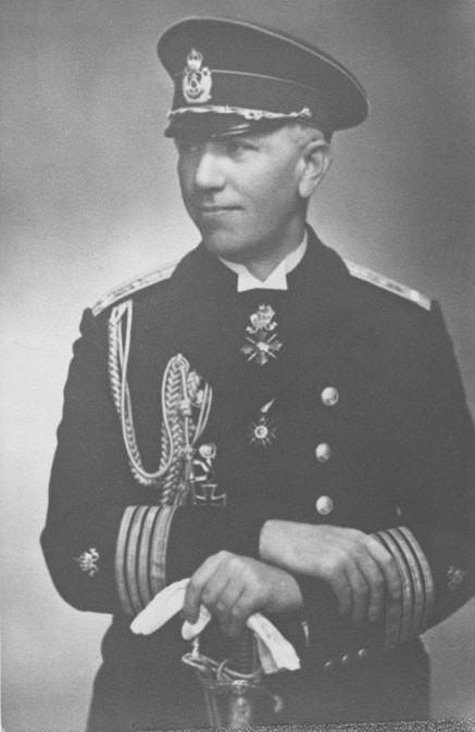 Капитан І ранг Георги Славянов, директор на служба Водни съобщения.